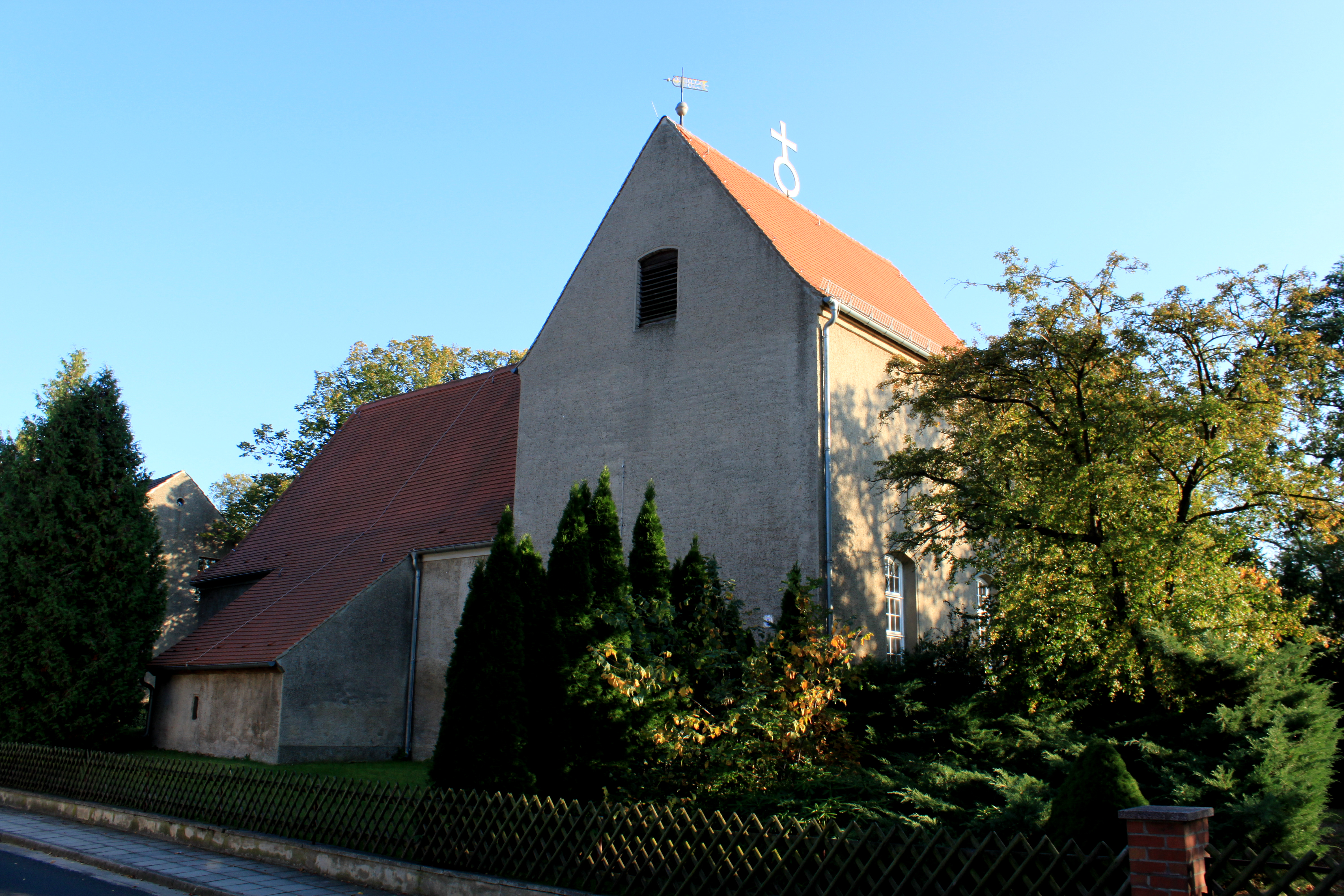 Würdenhain